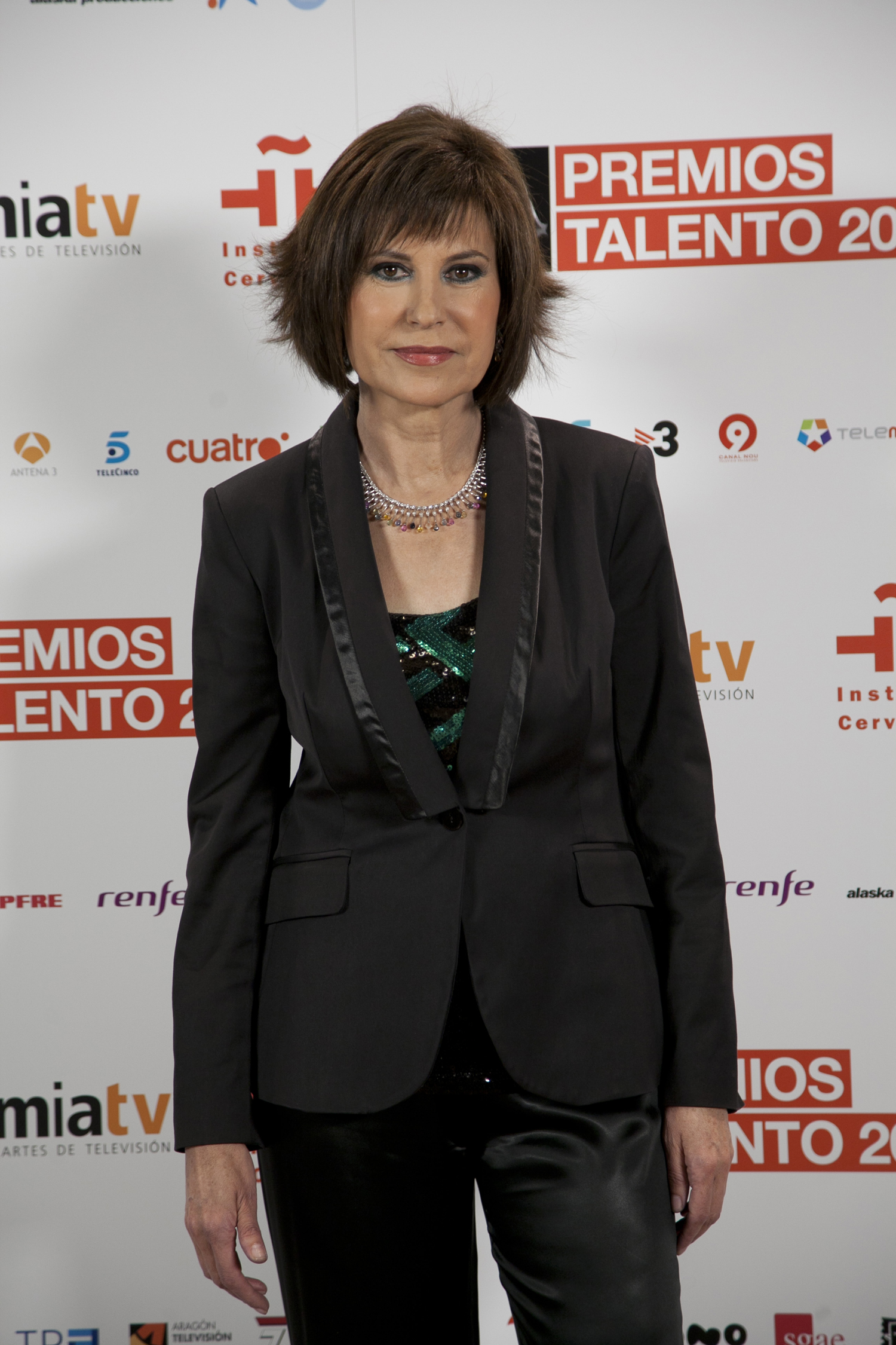 La periodista Concha García Campoy posa en el photocall de los Premios Talento 2012 que ofreció la Academia de las Ciencias y las Artes de Televisión de España (ATV) en noviembre de 2012.